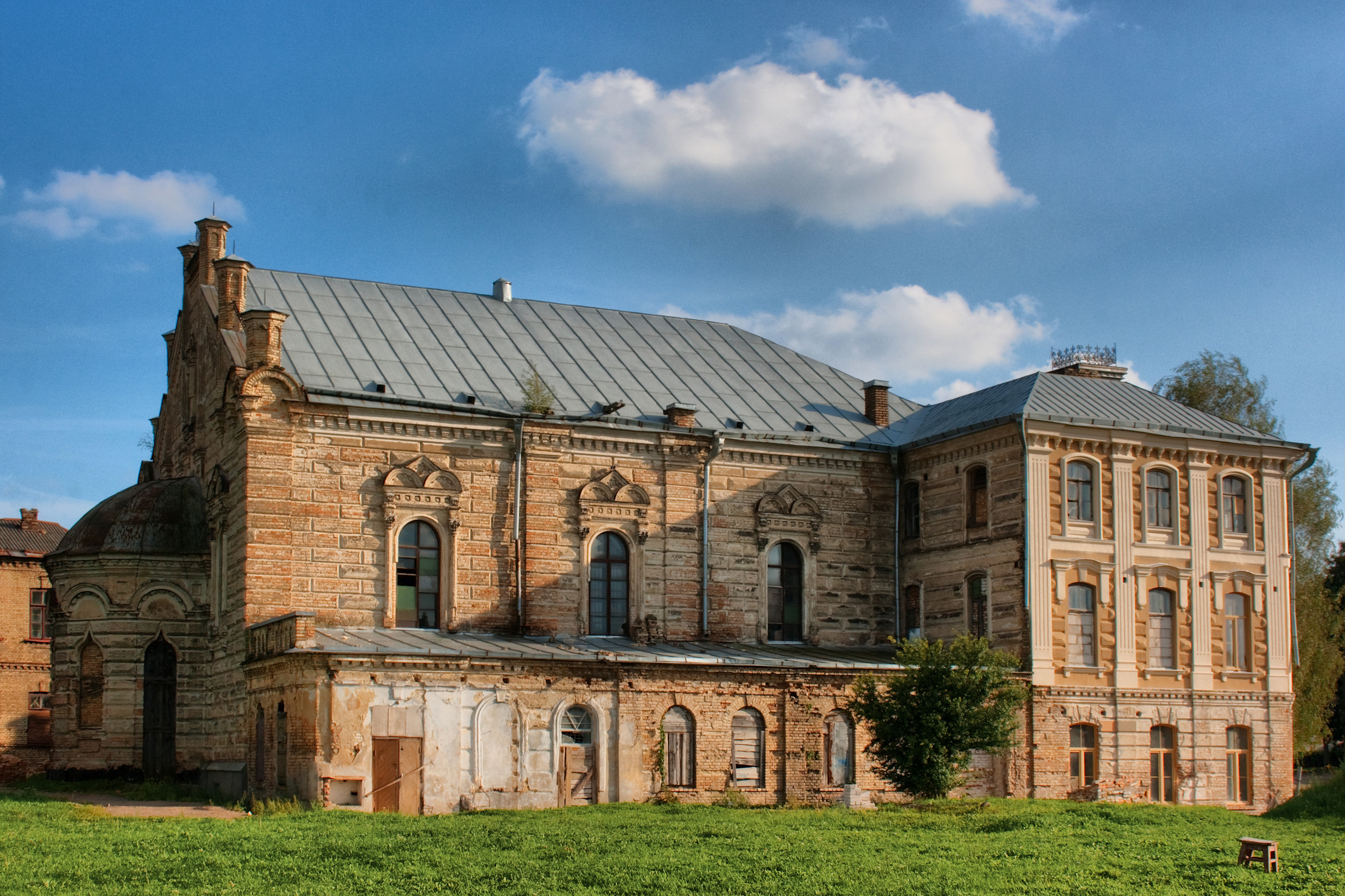 Беларуская (тарашкевіца): Былая сінагога. г. Горадня This is a photo of Belarusian heritage monument. Reference number: 412Г000029 ( WLM)